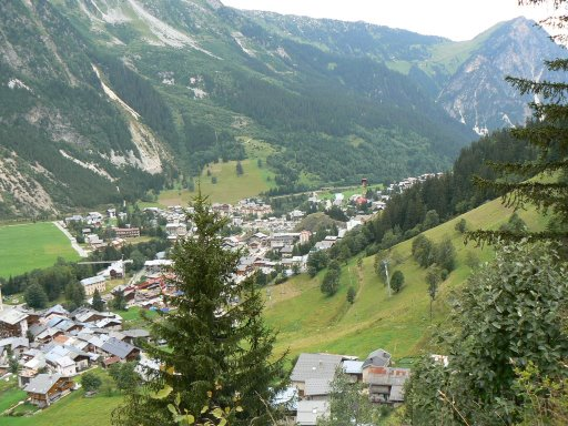 Pralognan la Vanoise (France's village in Alpes)